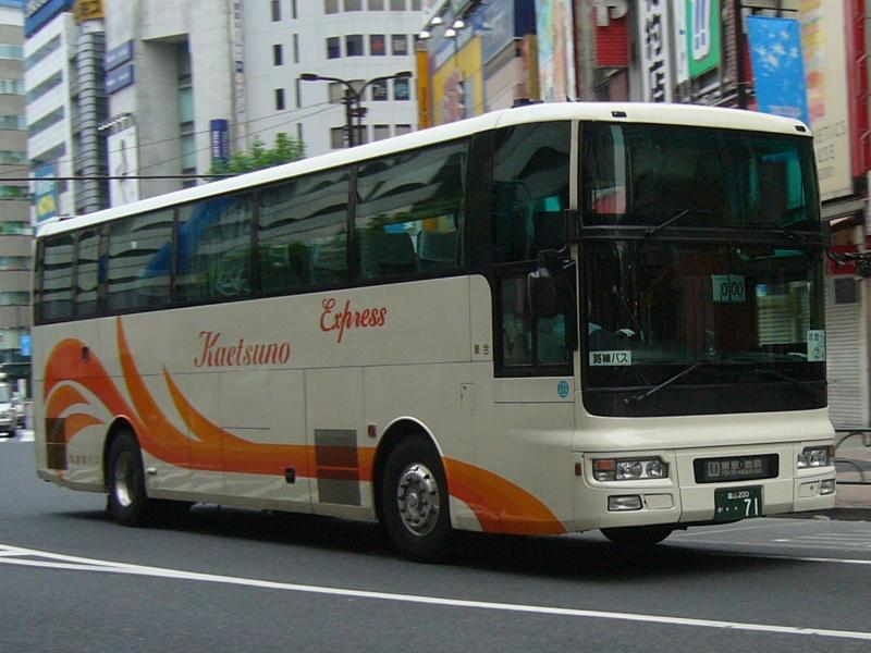 登録番号 富山200か・・71 加越能鉄道所属 東京～高岡・氷見線用 2006年7月3日 池袋駅東口にて撮影